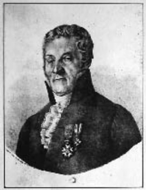 Joseph Clément Tissot (* 1747; † 1826), französischer Mediziner